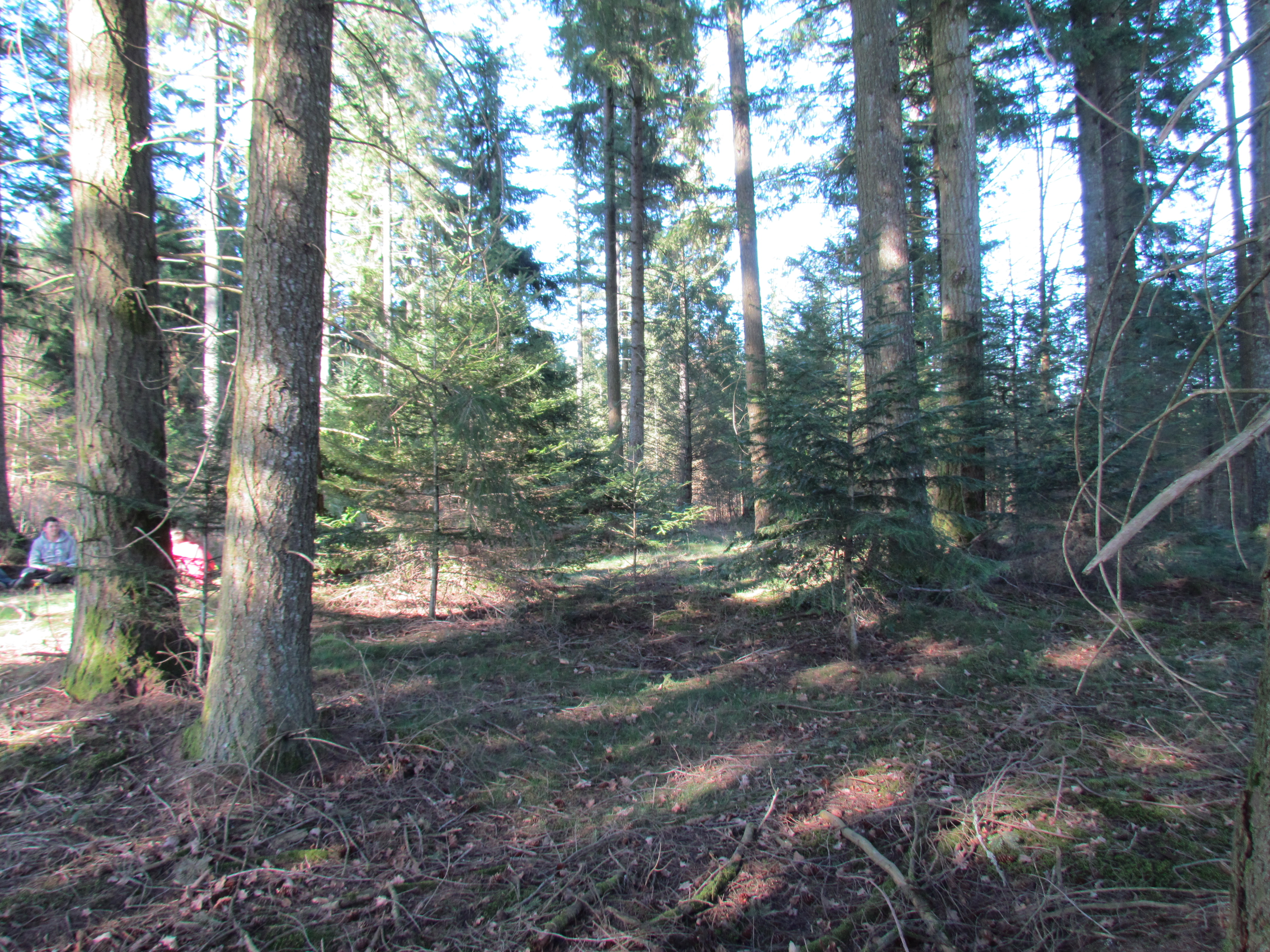 Régénération naturelle dans un peuplement de Douglas d'environ 80 ans près d'Ussel (Corrèze)